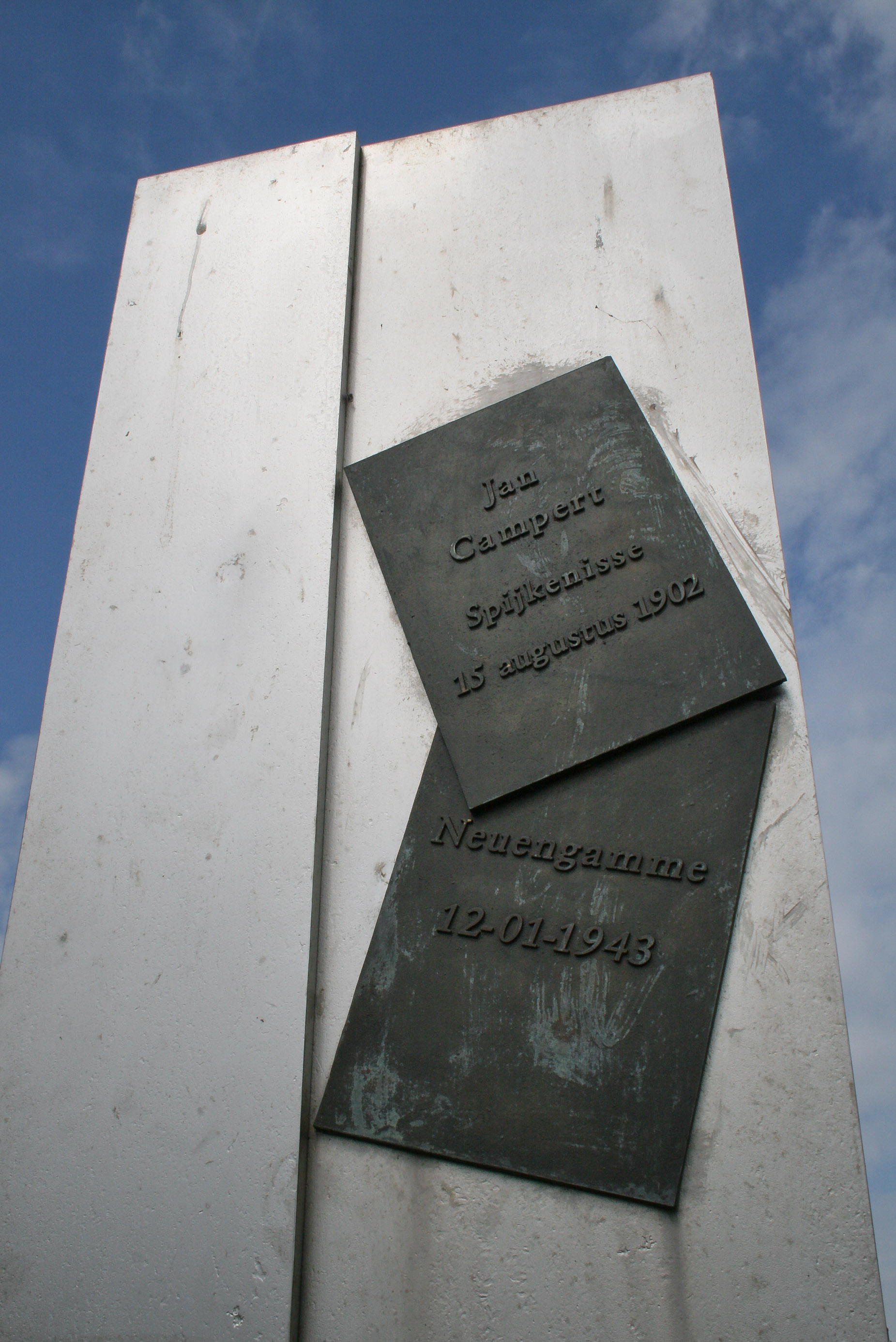 Monument voor Jan Campert, Jan Campertkade, Spijkenisse Helen Ferdinand, 2002